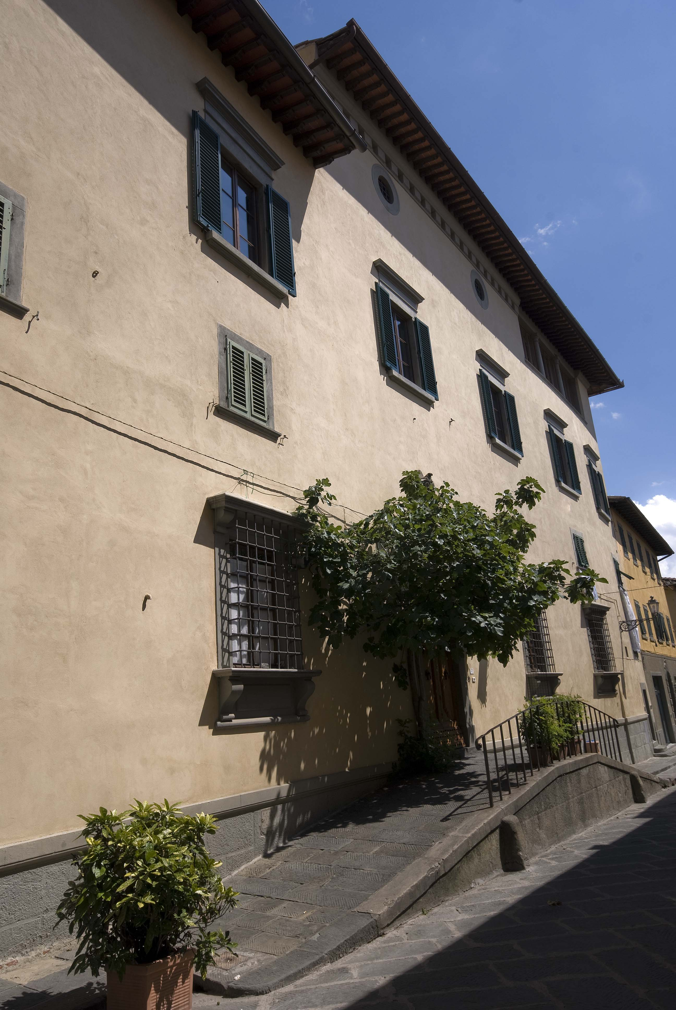 Palazzo del greco - San Casciano in Val di Pesa